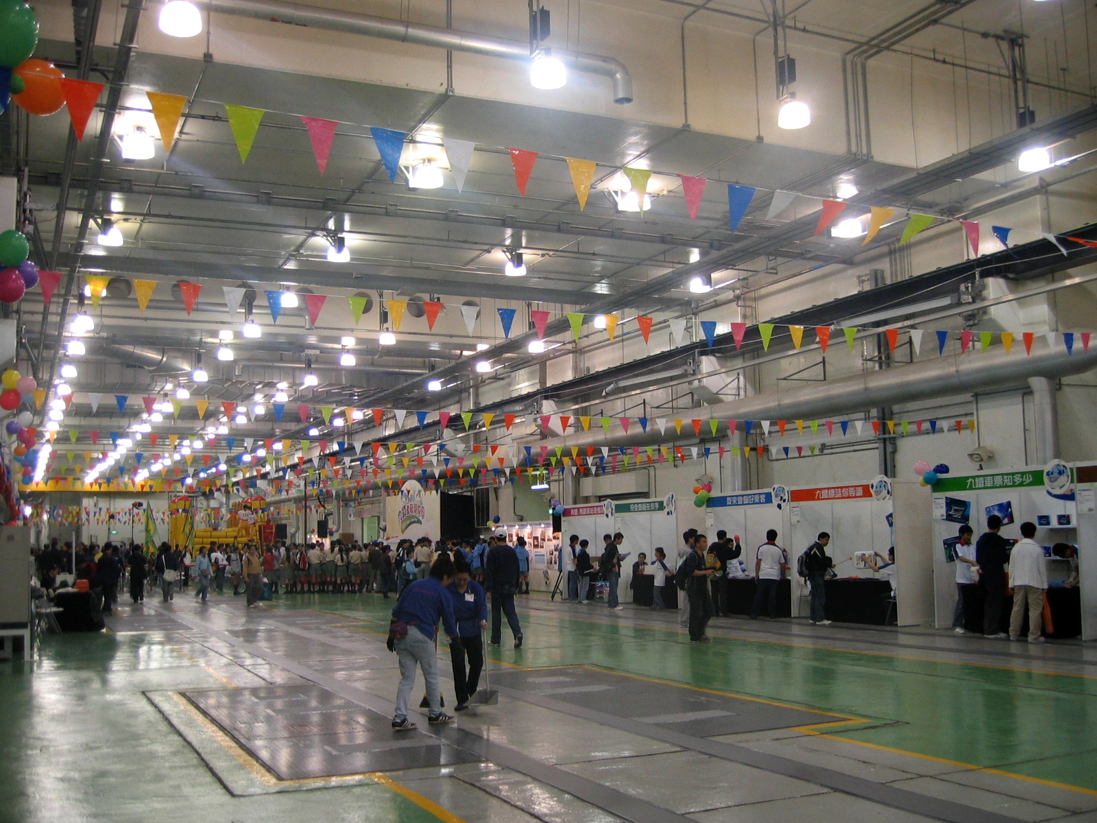 Tai Wai Maintenance Centre Control Room 大圍車廠